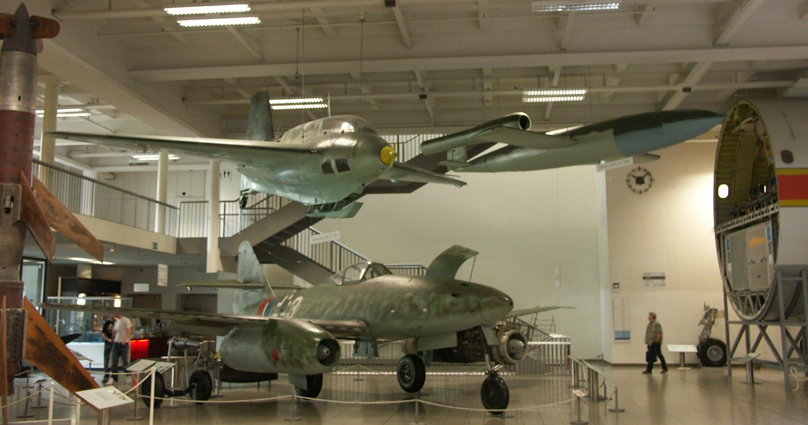 Deutsches Museum Munich Photo Jean-Patrick Donzey